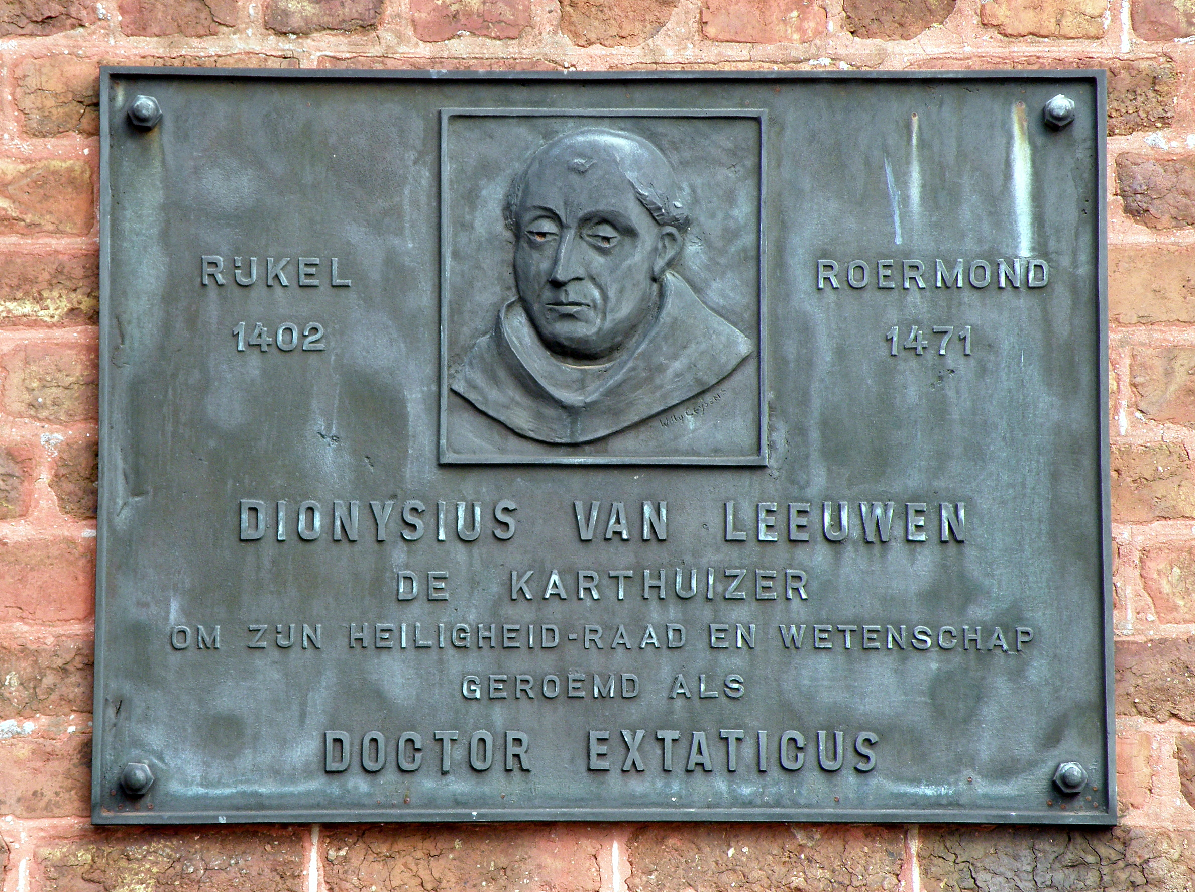 Borgloon, deelgem. Rijkel. Gedenkplaat Denis de Karthuizer, aangebracht tegen de voorgevel van de dorpskerk.